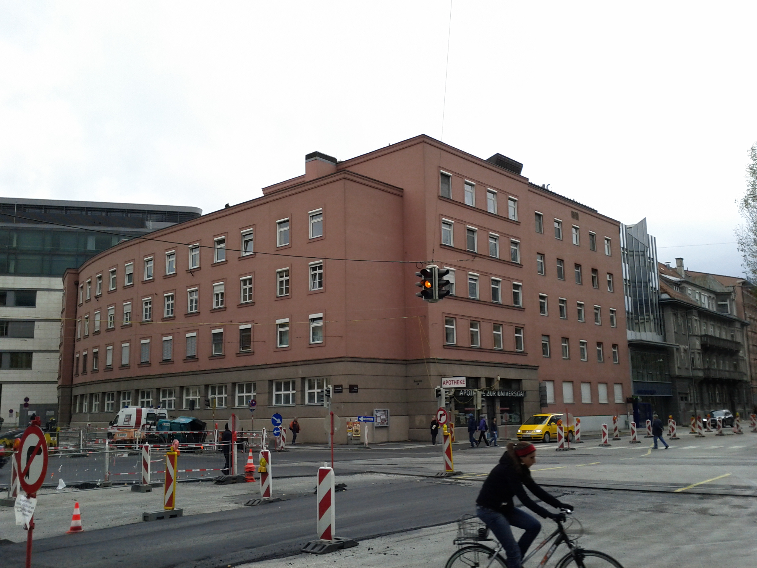 Landeskrankenhaus: Innrain 47 in Innsbruck